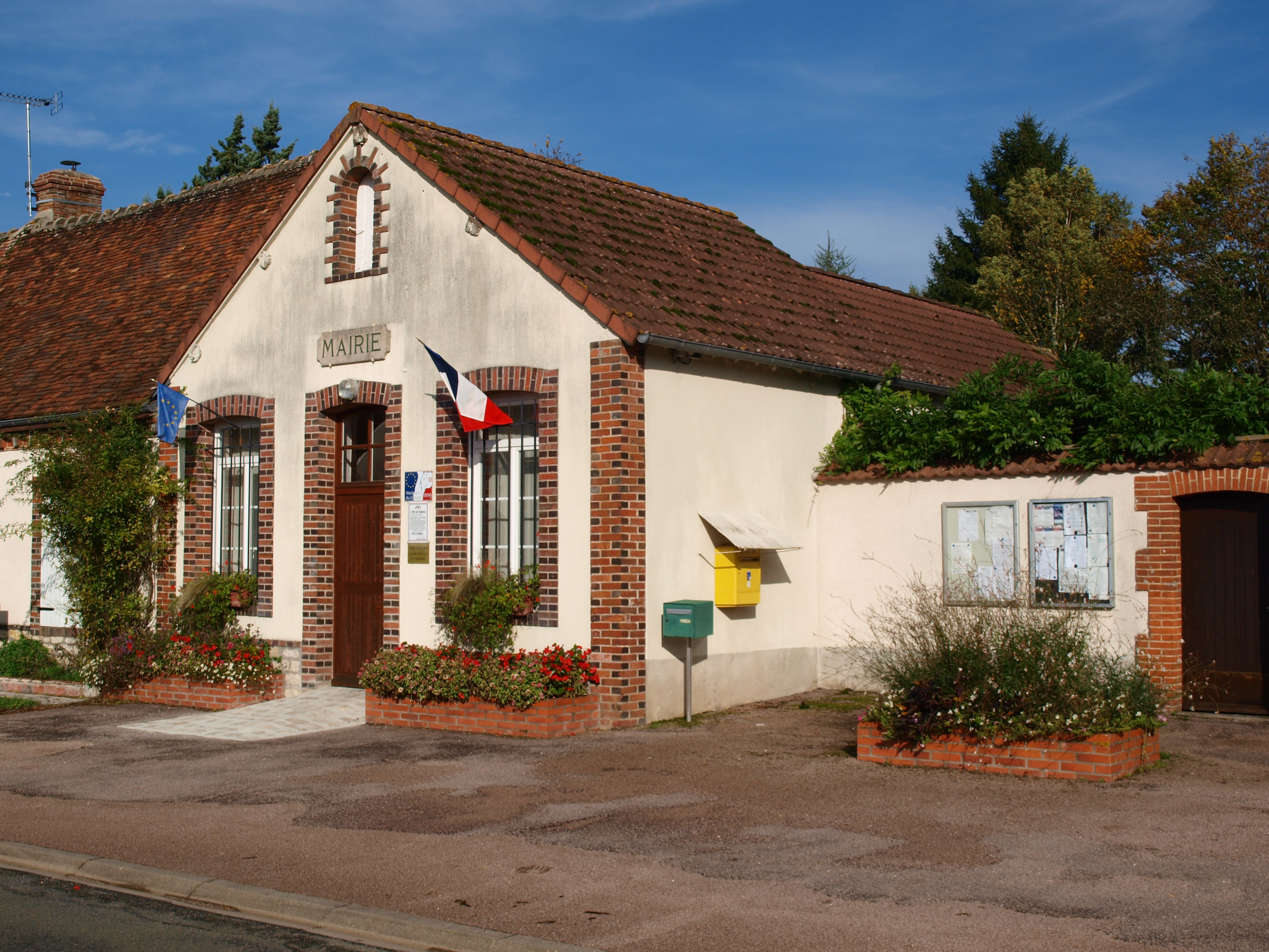 Feins-en-Gâtinais (Loiret, France) ; mairie